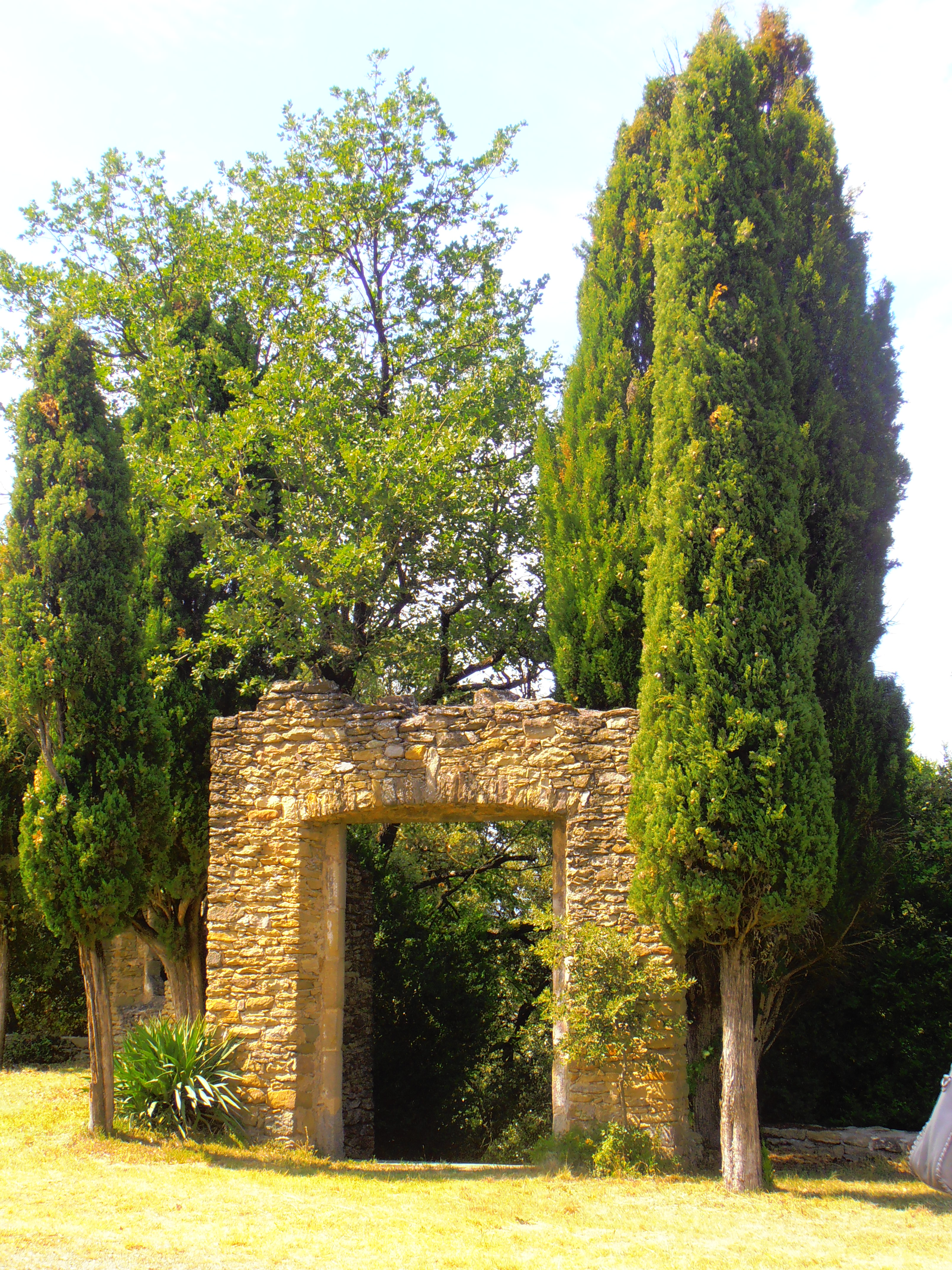 Un portal que devia ser a l'antiga muralla